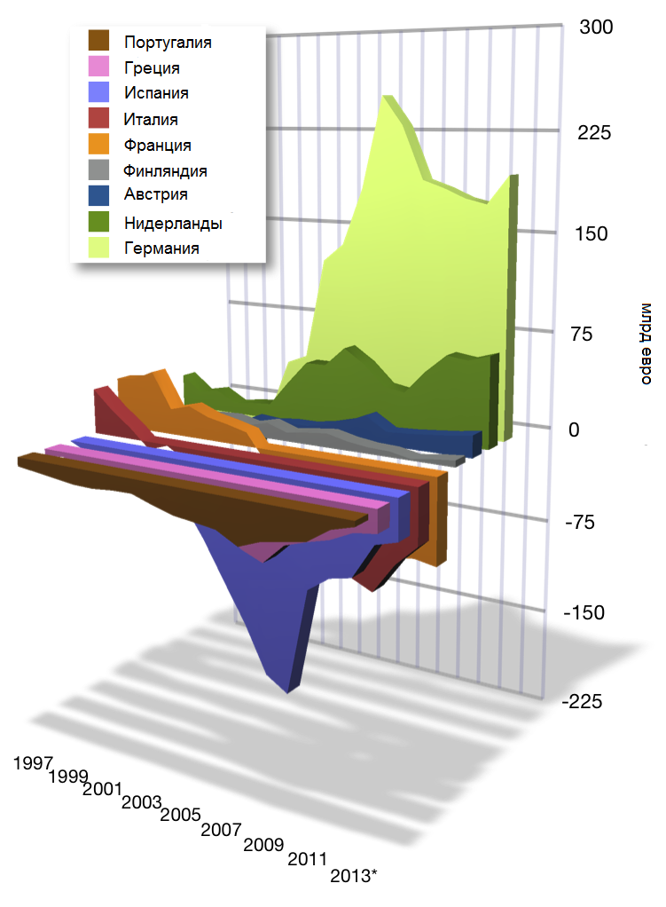 Абсолютная величина дефицита или профицита счетов текущих платёжных балансов Германии, Нидерландов, Австрии, Финляндии, Португалии, Греции, Франции, Италии и Испании за 1997-2013 гг. Источник: экономические прогнозы ОЭСР